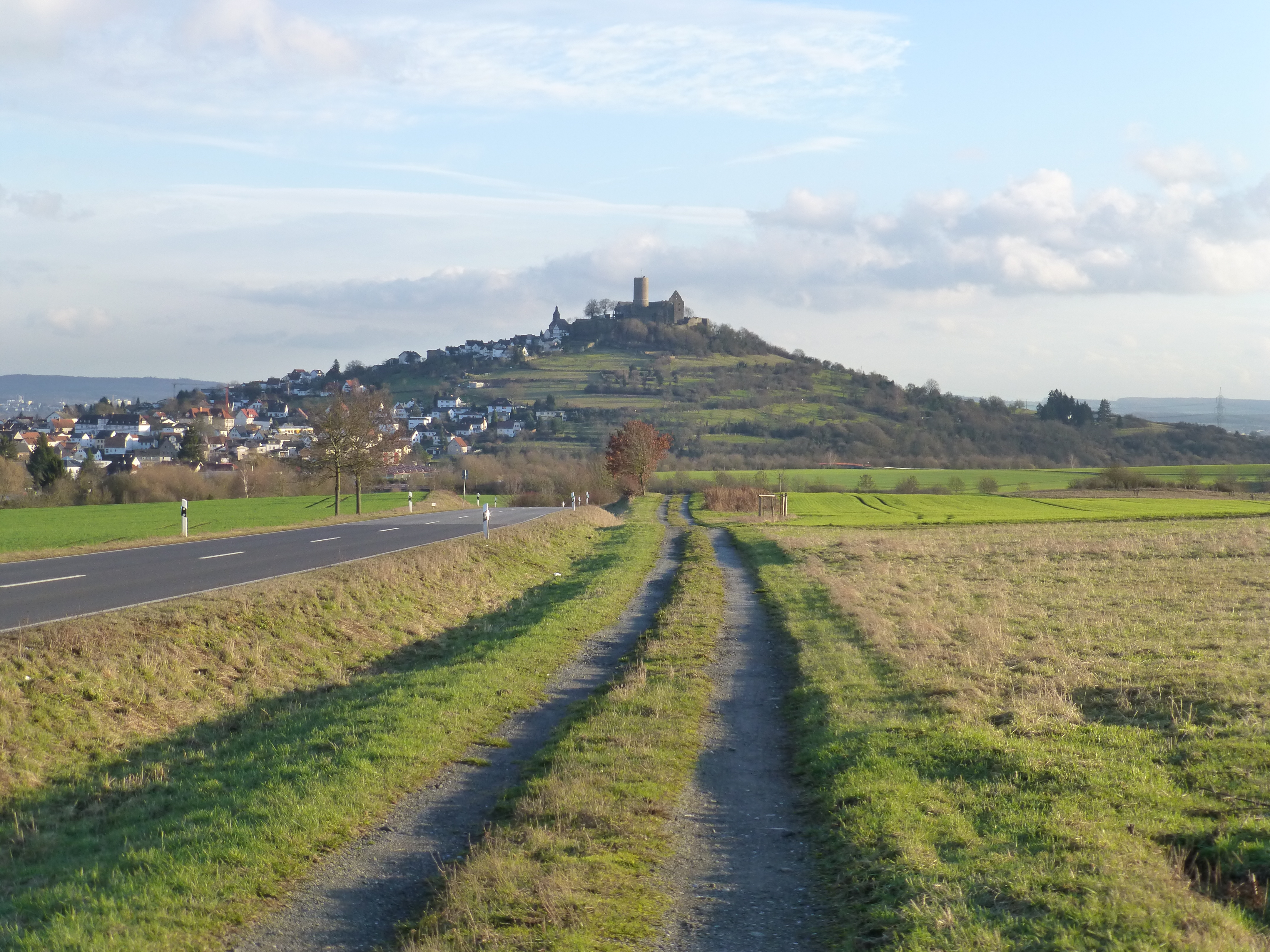 Blick zum Gleiberg mit Burg Gleiberg